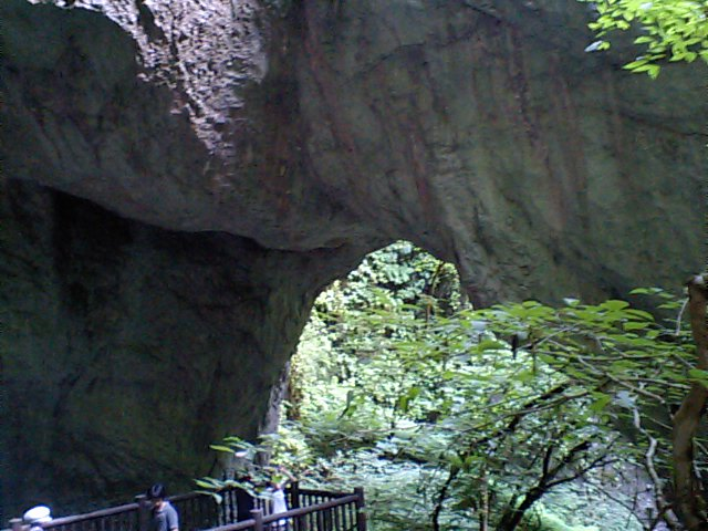 岡山県新見市にある鍾乳洞「羅生門」